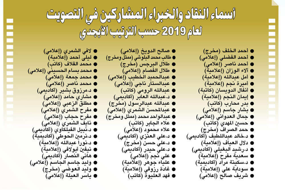 اسماء النقاد والخبراء المشاركين في اختيار ترشيحات جائزة شعلة الانباء لدورها الثاني للعام 2019